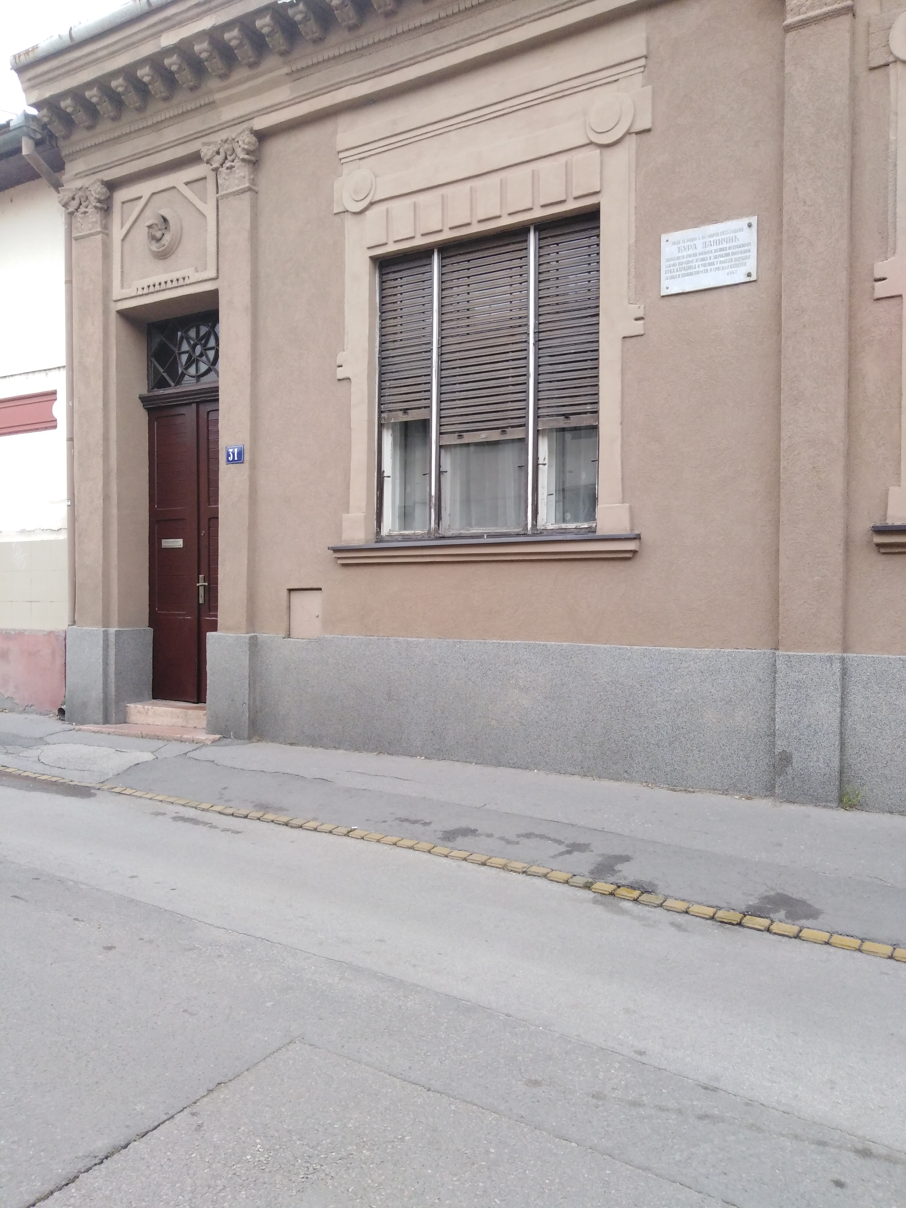 Родна кућа Ђуре Даничића у Новом Саду, улица Златне греде бр. 31